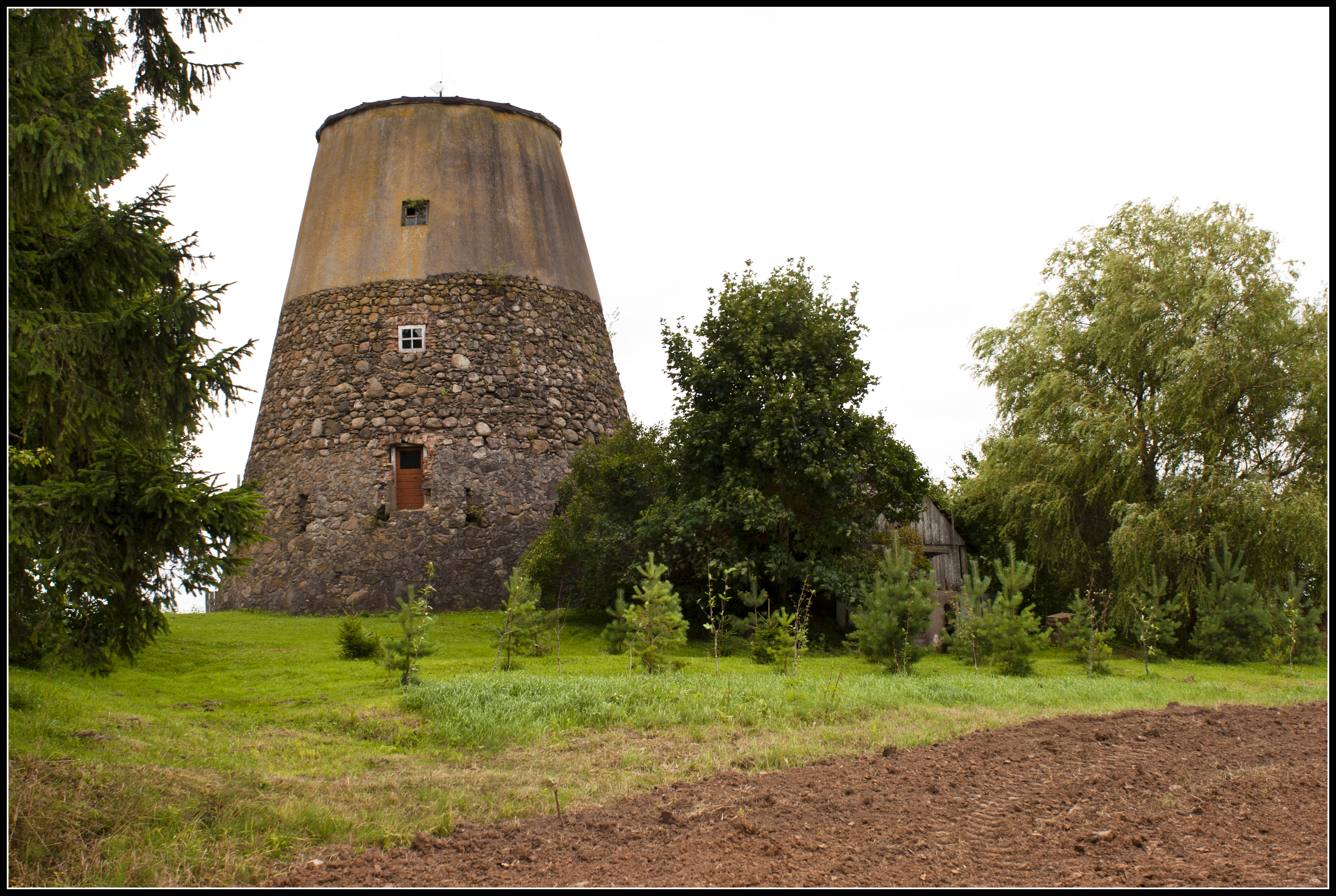 Degoles vējdzirnavas / Degole windmill